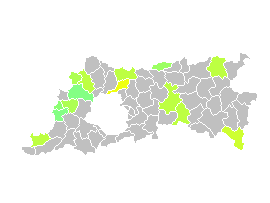 Locatie van Finse pistes in de Belgische provincie Vlaams-Brabant (met kleurschakering voor afstandsgradering). Indien er meerdere pistes aanwezig zijn wordt de langste weergegeven.